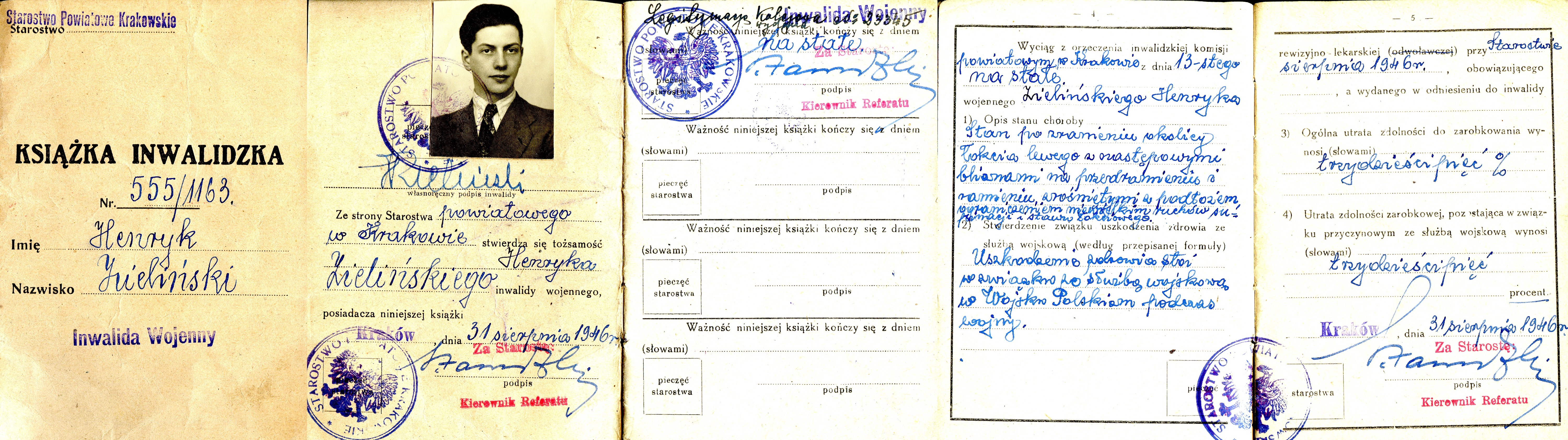 Książka inwalidzka Henryka Zielińskiego